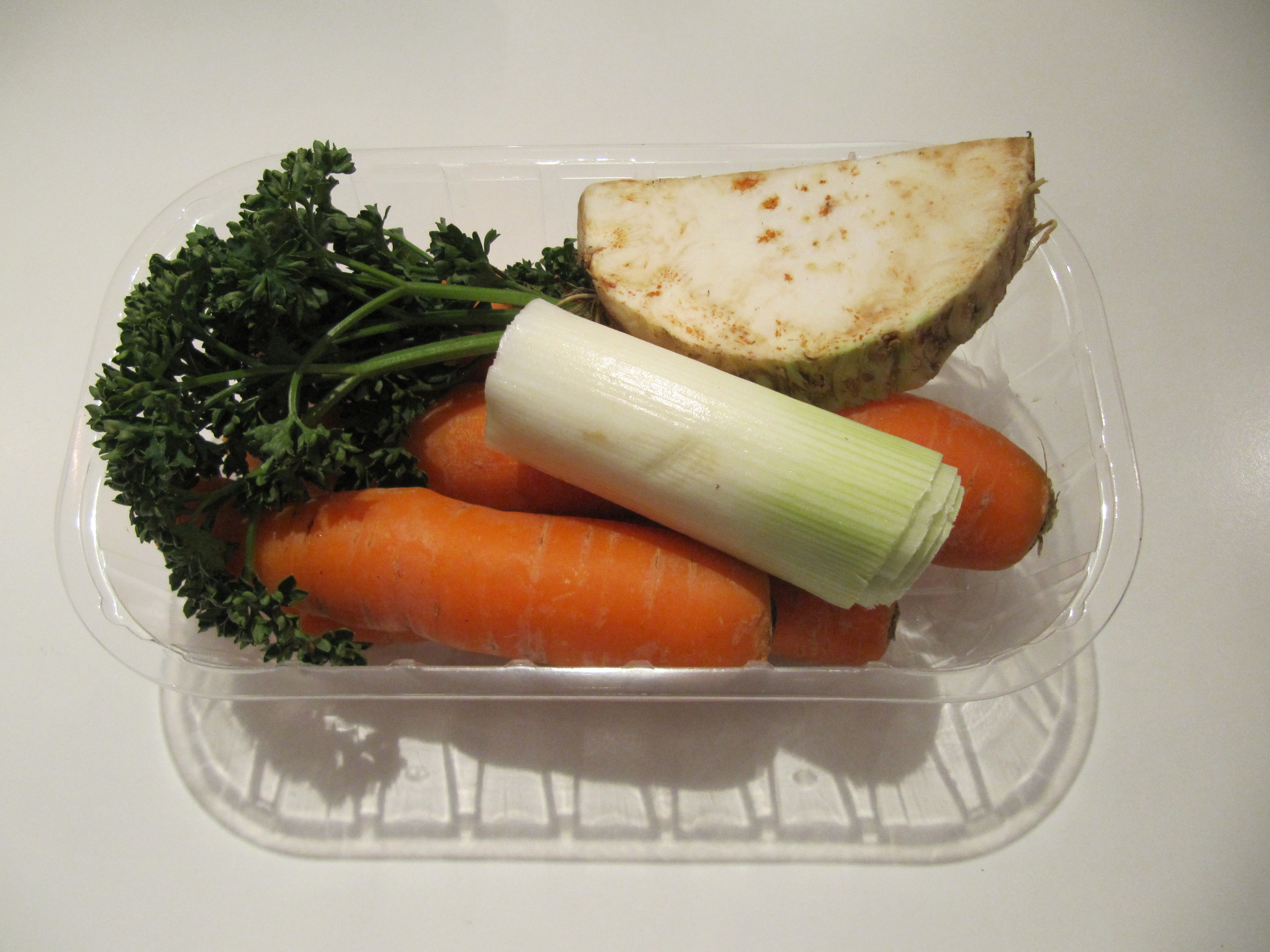 Eine ausgepackte Schale mit Suppengrün